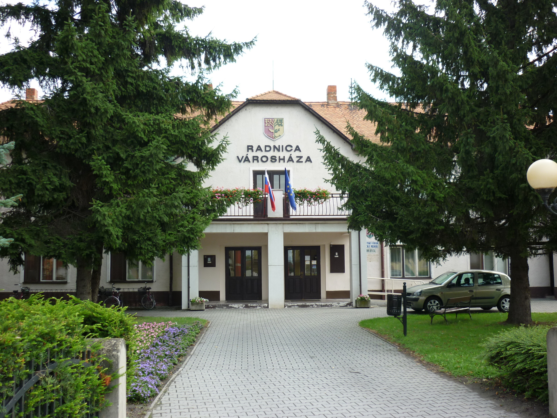 Veľký Meder